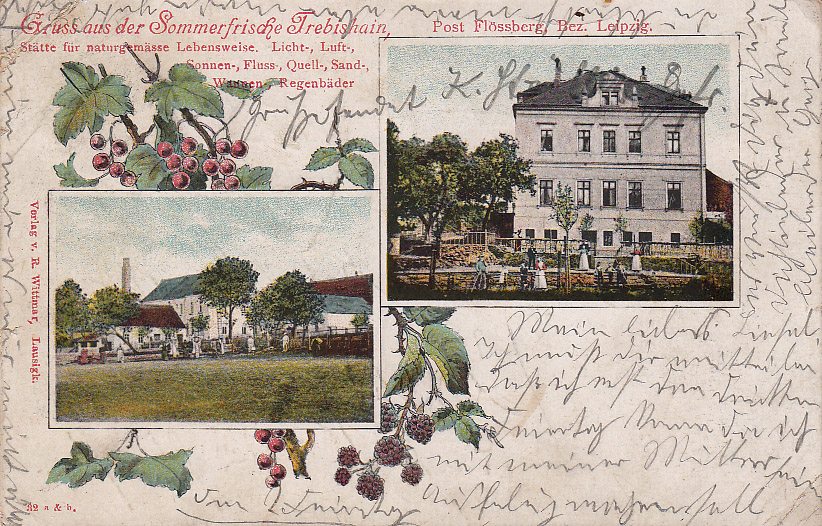 Postkarte (Lithographie) von der Sommerfrische Trebishain/Sachsen